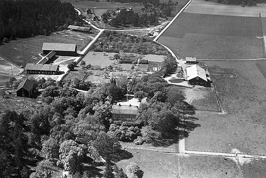 Flygfoto från sommaren 1936 över Skå Edeby med alla jordbruksbyggnader som fanns då. Stall och lador revs 1946, när Barnbyn Skå byggdes upp.